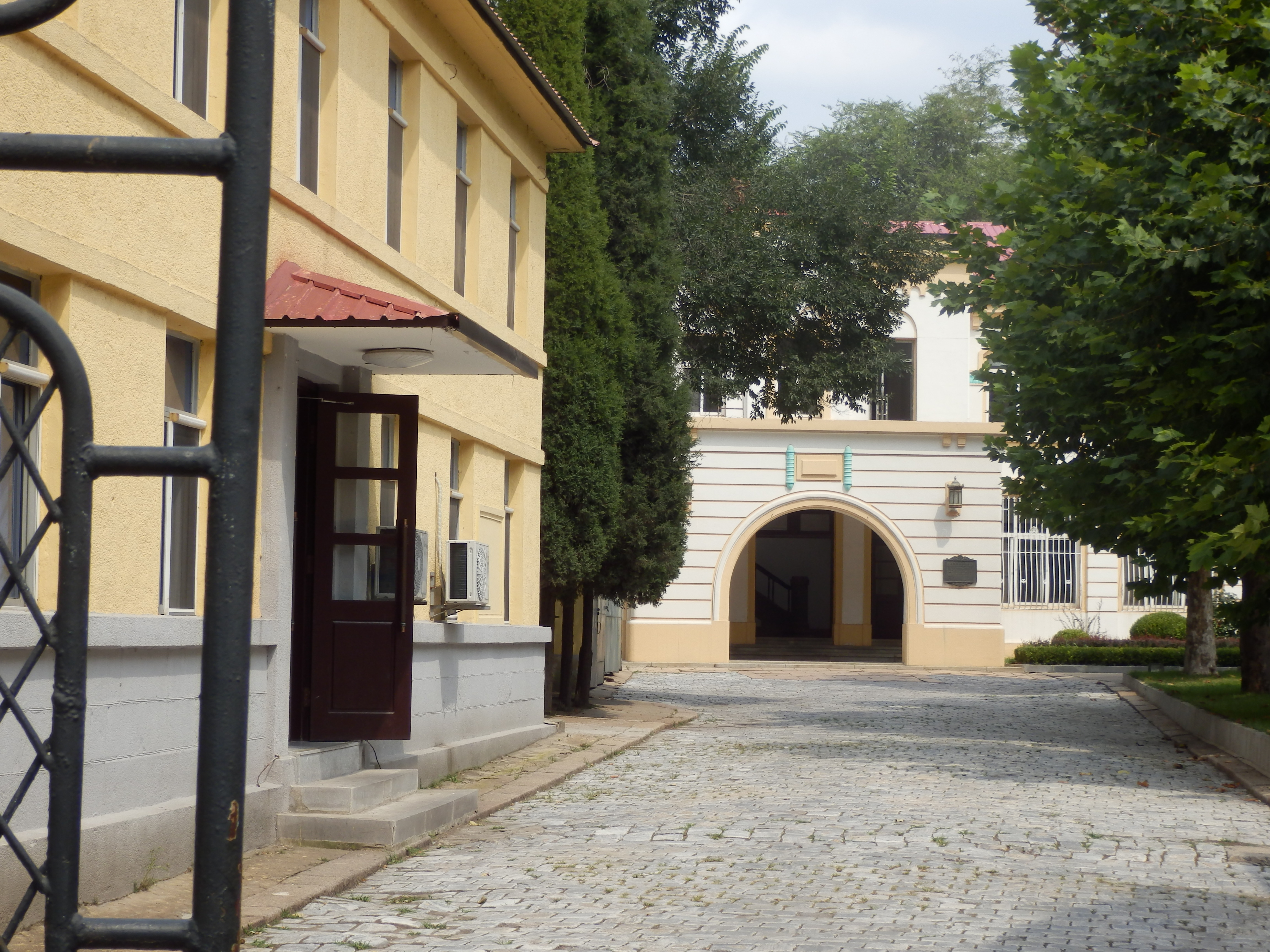 中文（中国大陆）: 关东军总督府